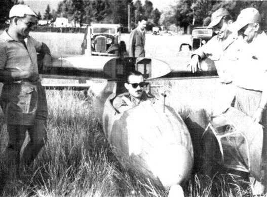 Miembros del club de planeadores Cóndor, club establecido en Merlo entre 1938 y 1974. El piloto es Adolf Galland, 1953.